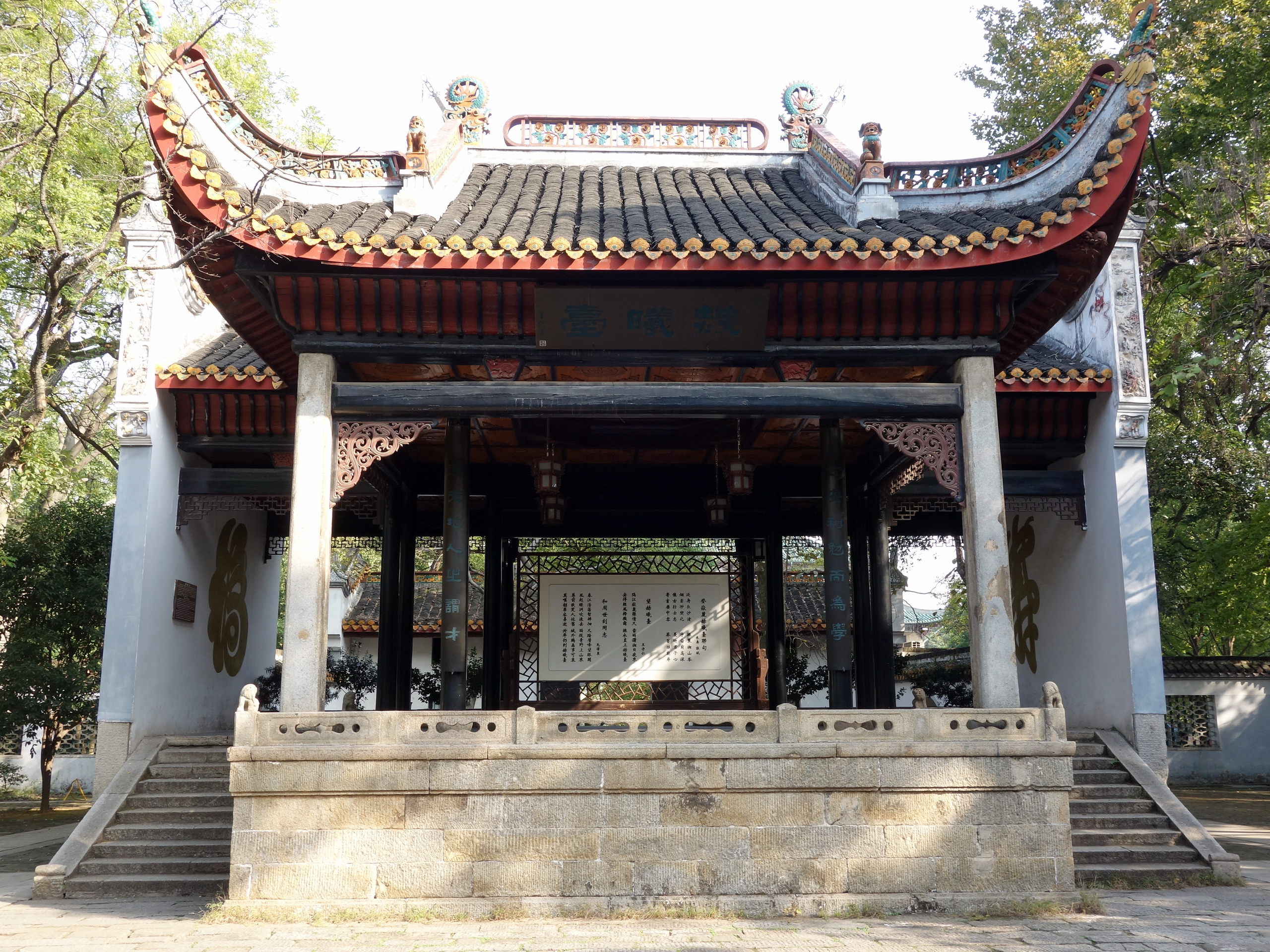 岳麓书院赫曦台